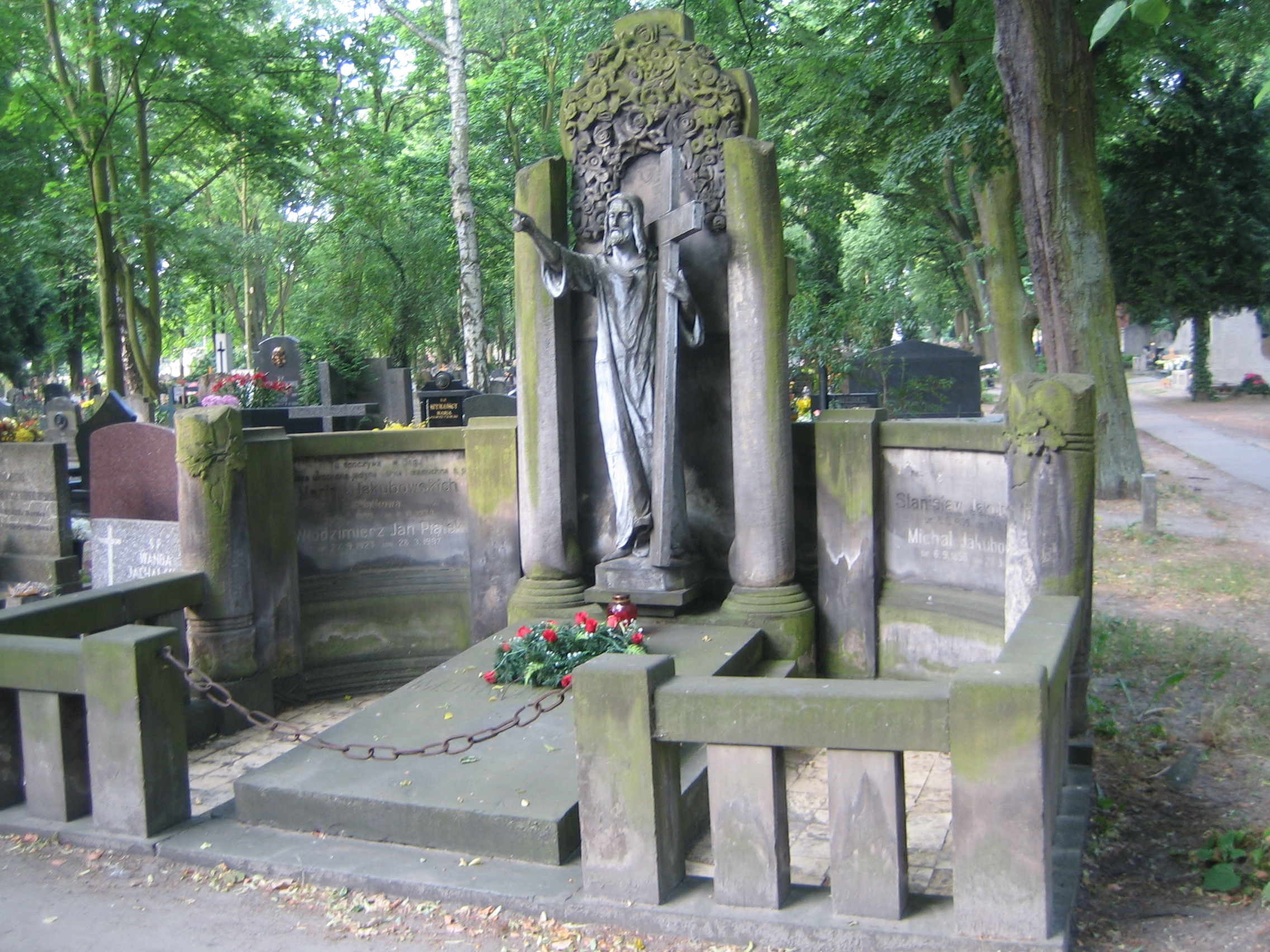 Nagrobek Jakubowskich na cmentarzu na Jeżycach